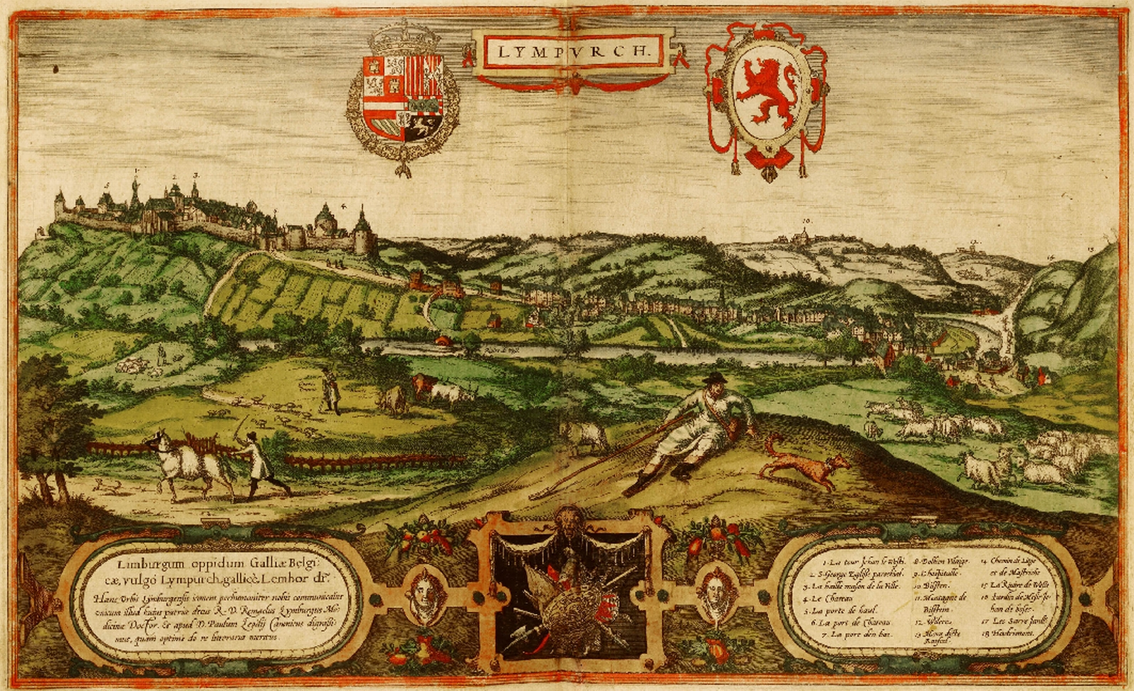 Beeld van de stad Limburg, hoofdstad van het hertogdom Limburg; 1575